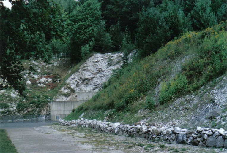 Der 1995 angelegte Zugang zum Stollensystem des Konzentrationslagers Dora. Der ursprüngliche Stolleneingang B (1947 gesprengt) lag links daneben.)